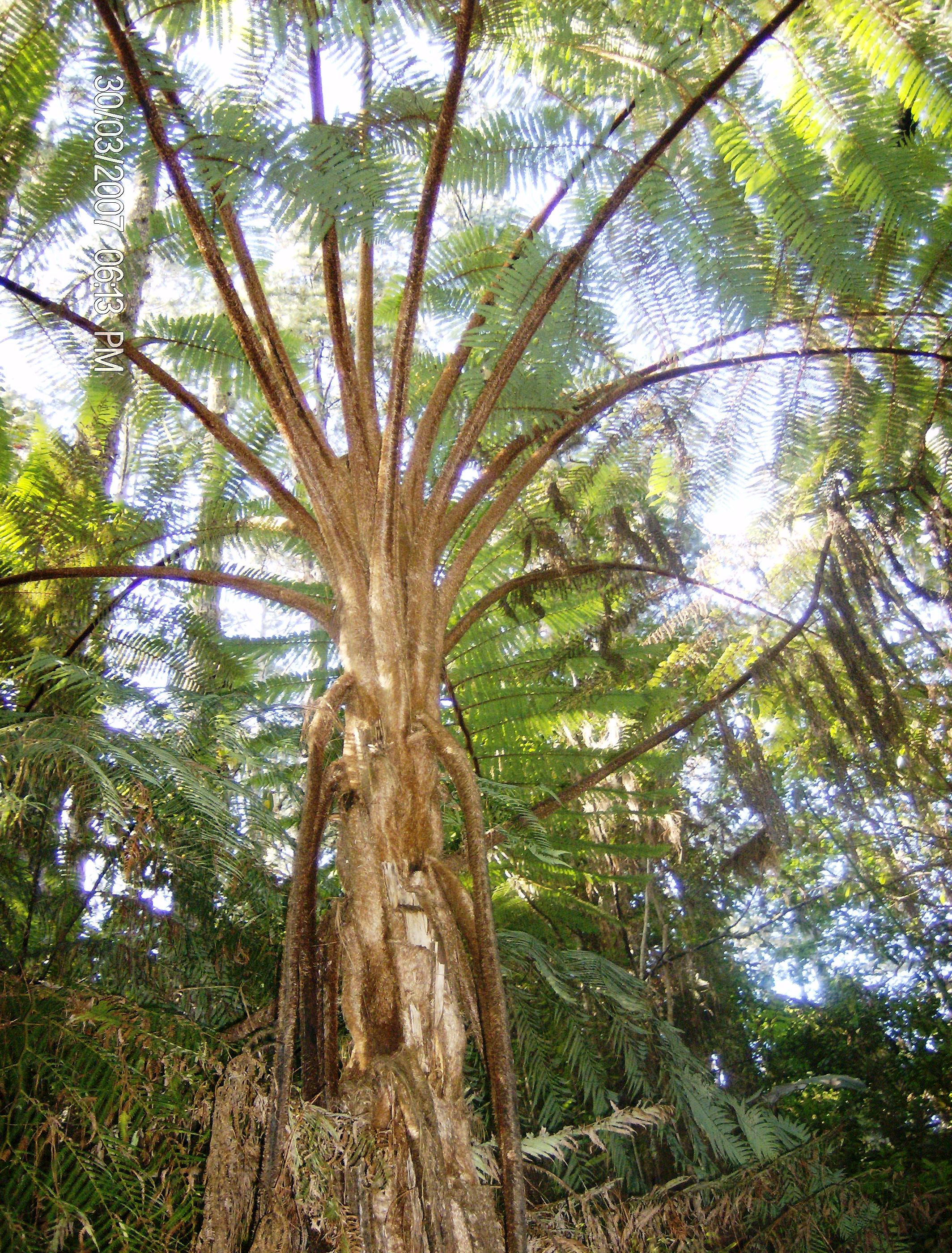 Helecho arboreo cola de mono en el parque nacional el cusuco en honduras